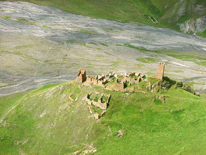 Georgia, Caucasus